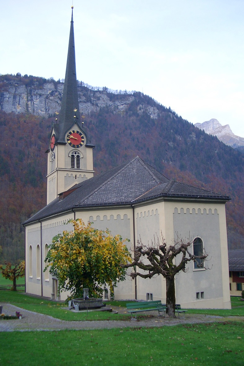 Foto der reformierten Kirche Linthal GL, Schweiz